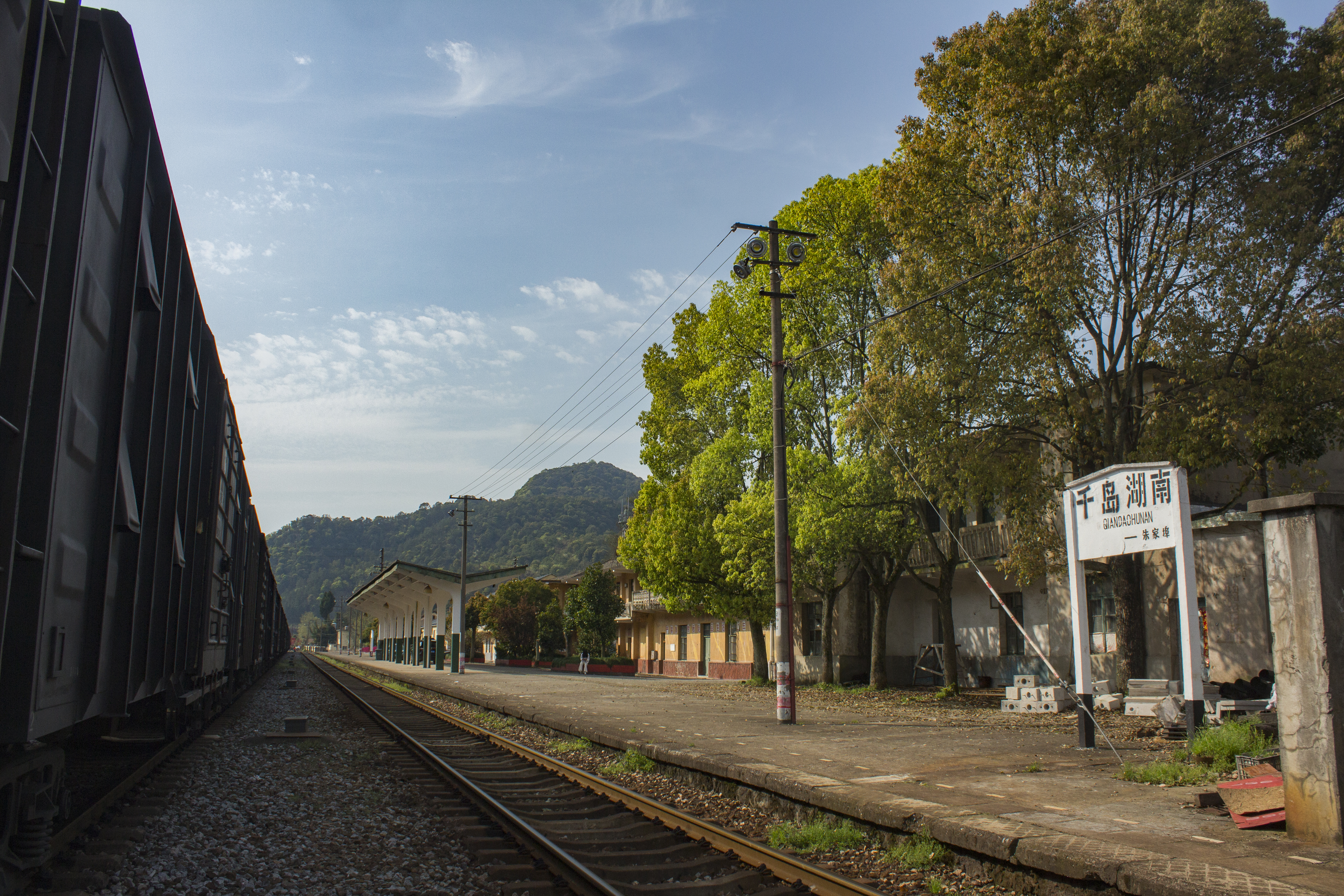 中文（中国大陆）: 摄与2019年4月6日